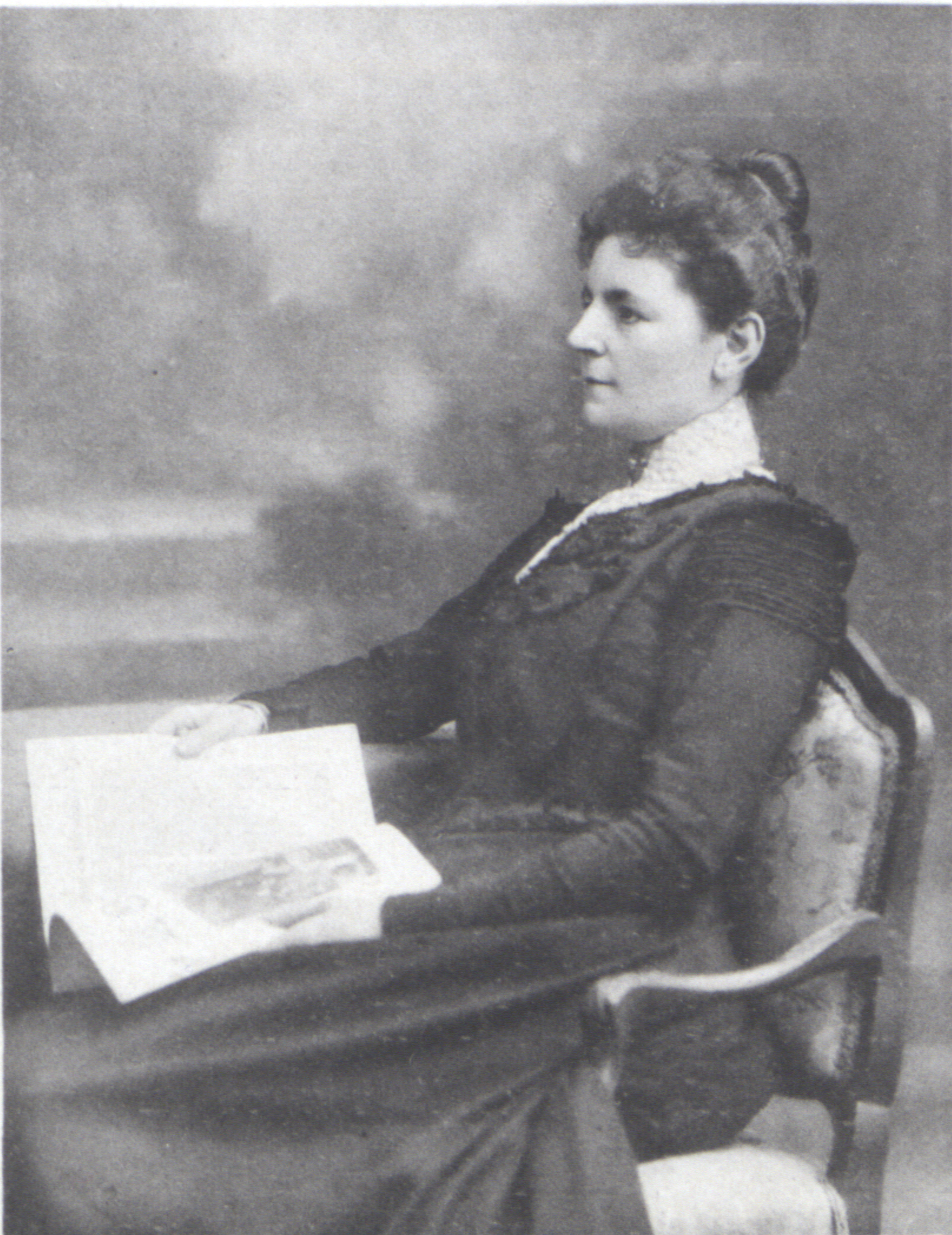 Emma Mathilde von Andreae geb. Peltzer um 1900